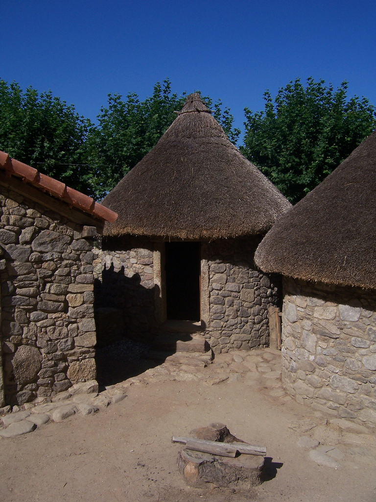 Patio delante de la unidad familiar recreada. En el centro de la foto, el almacén. Basándose en la información proporcionada por el yacimiento y por otros castros similares, se han reproducido tres edificios que ilustran un momento inicial de la ocupación romana. Almacén.